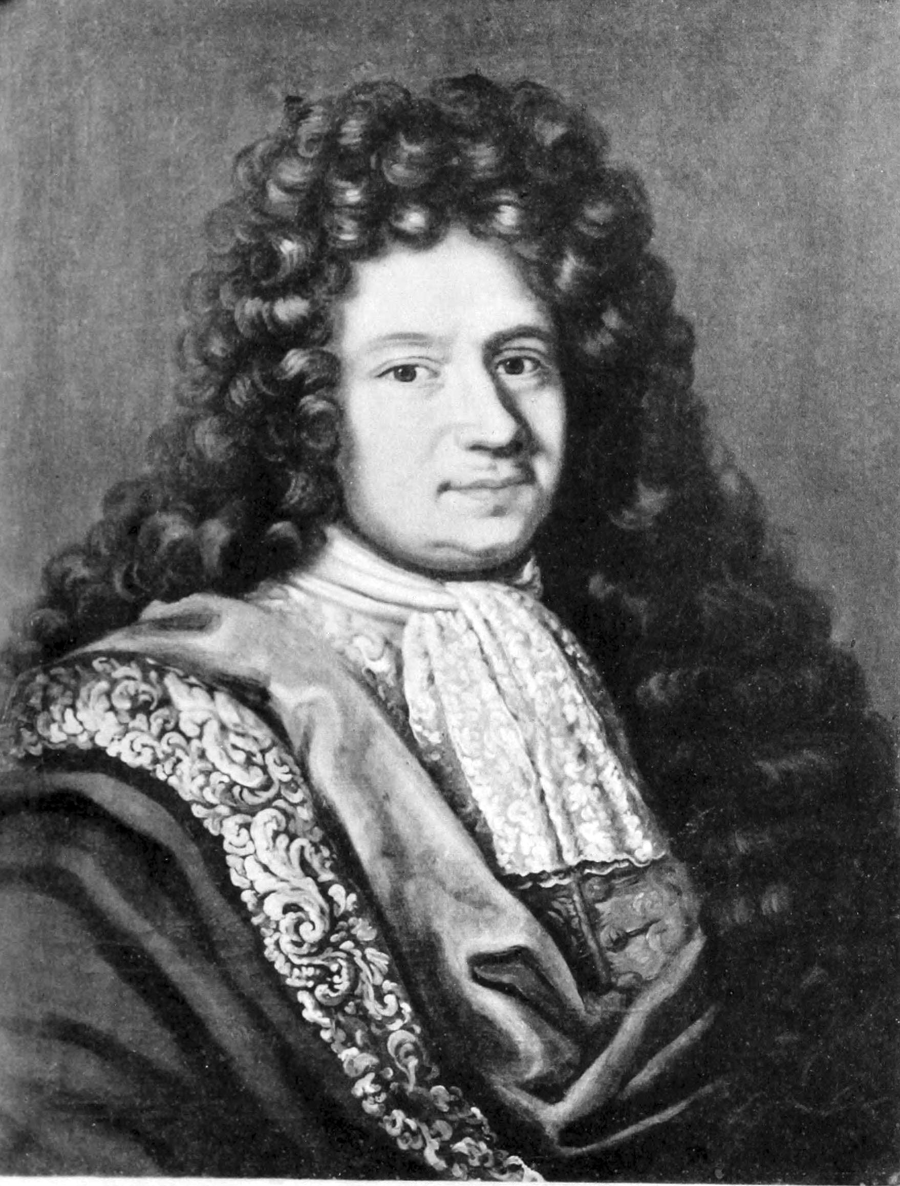 Andreas Drossander (1648-1696). Medelålders man, bröstbild, fas t. v., med bruna ögon, några svarta skäggstrån på öfverläppen, svart allongeperuk. hvit gulblommig dräkt, brunt blåfodradt draperi med silfver- och guldbroderad bård, brungrön bakgrund. På baksidan står: Andreas Drossander Nat. 1648, Denat. 1696. Olja på duk, 69 x 56 ctm. Upsala universitet. — Pl. VIA. — Samma porträtt hos Baron H. Rehbinder, Djursholm.